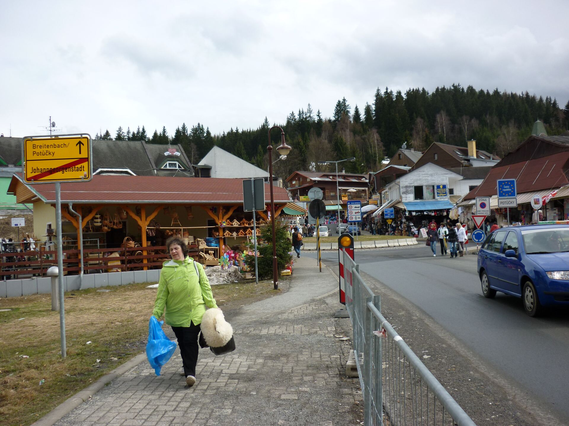 Vietnamští prodejci v Potůčkách